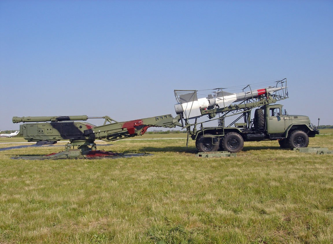 Neva, anti aircraft rocket system